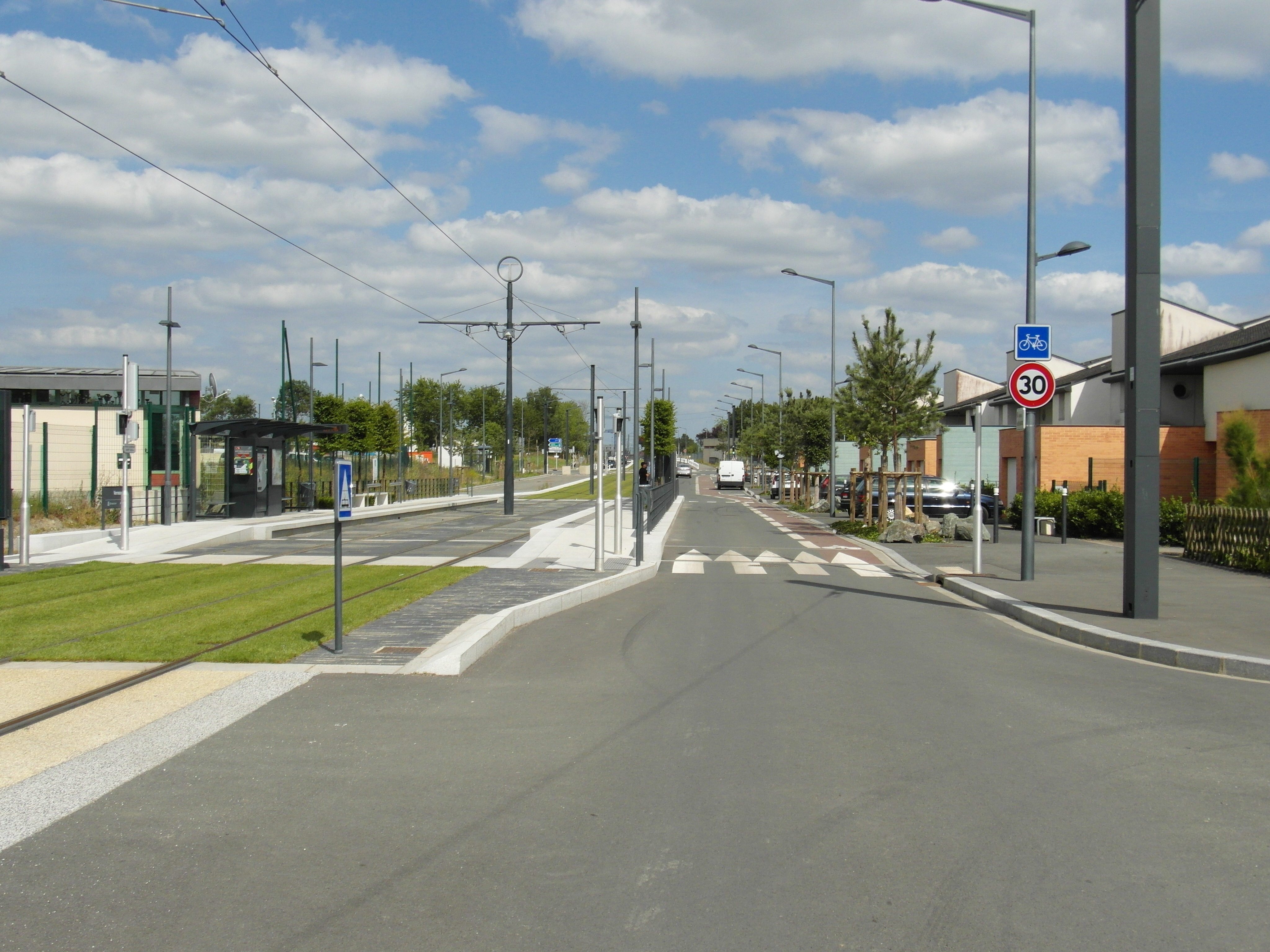 Straßenbahn Angers - Städtebeuliche Integration im Bereich Mayenne / Capucins, einem Entwicklungsgebiet auf ehemaligem Militärflughafengelände